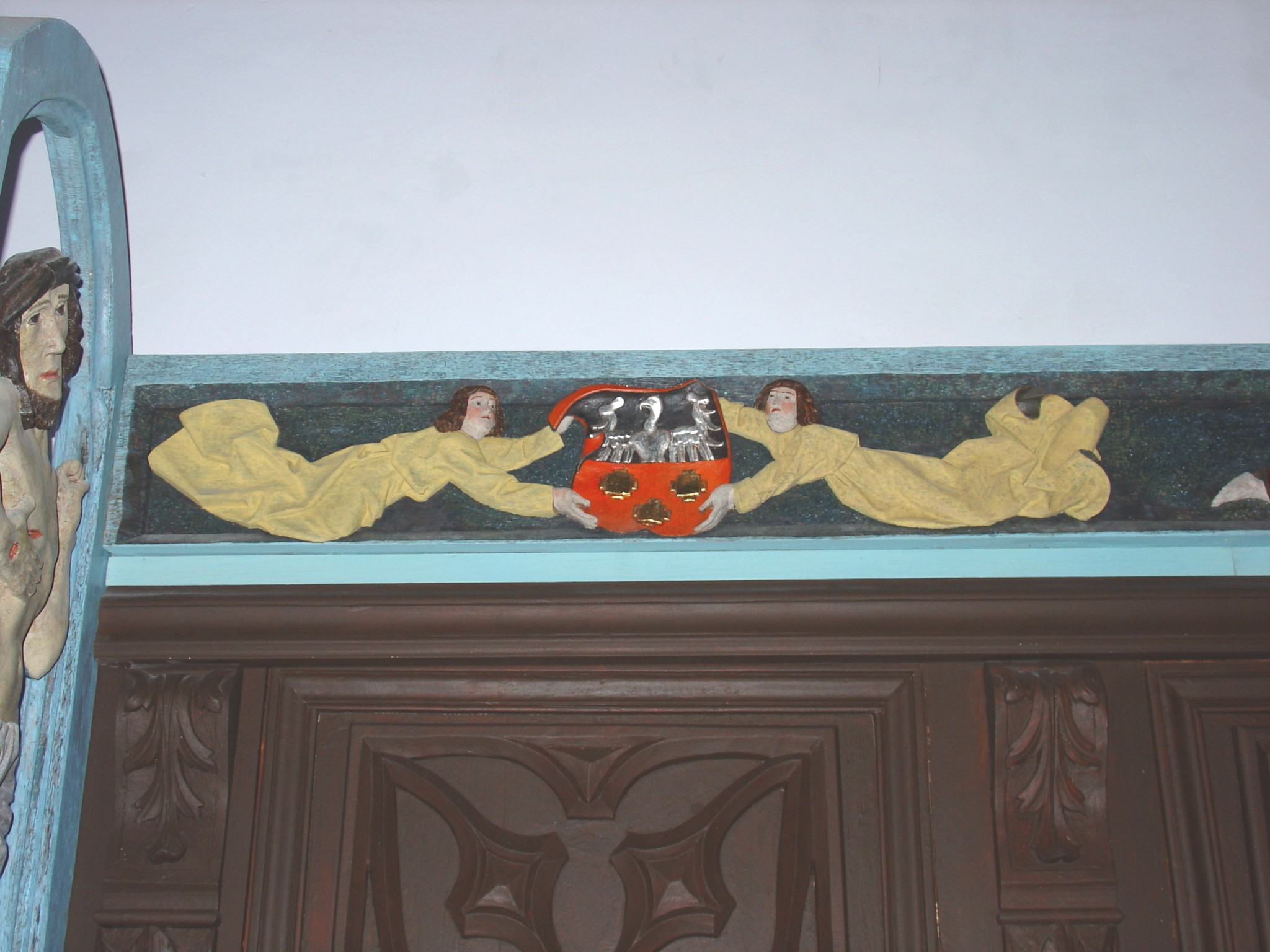 Herb Sulima - fryz z kościoła parafialnego w Bratoszewicach